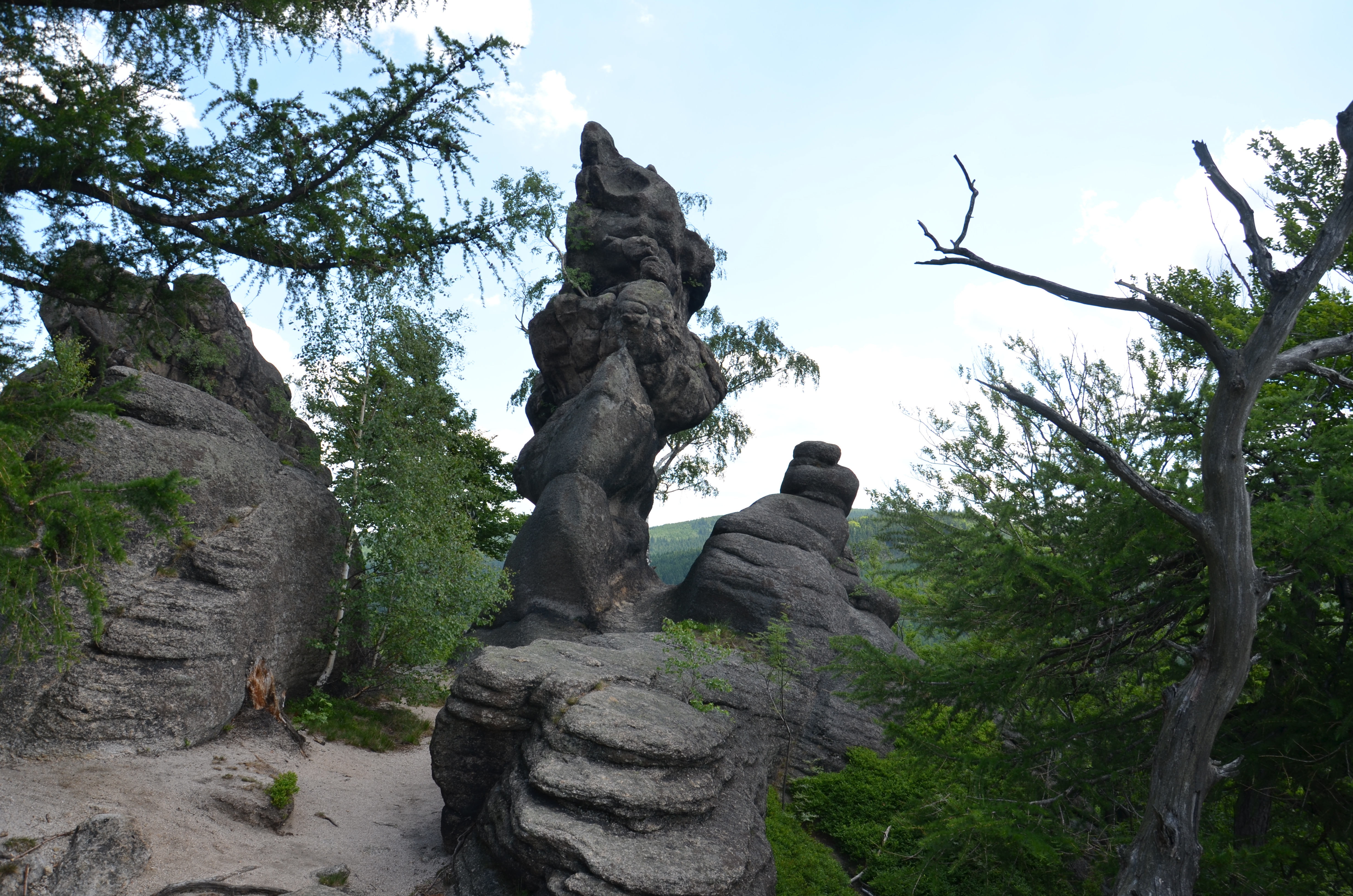 Masyw Starościńskich Skał-Rudawski Park Krajobrazowy